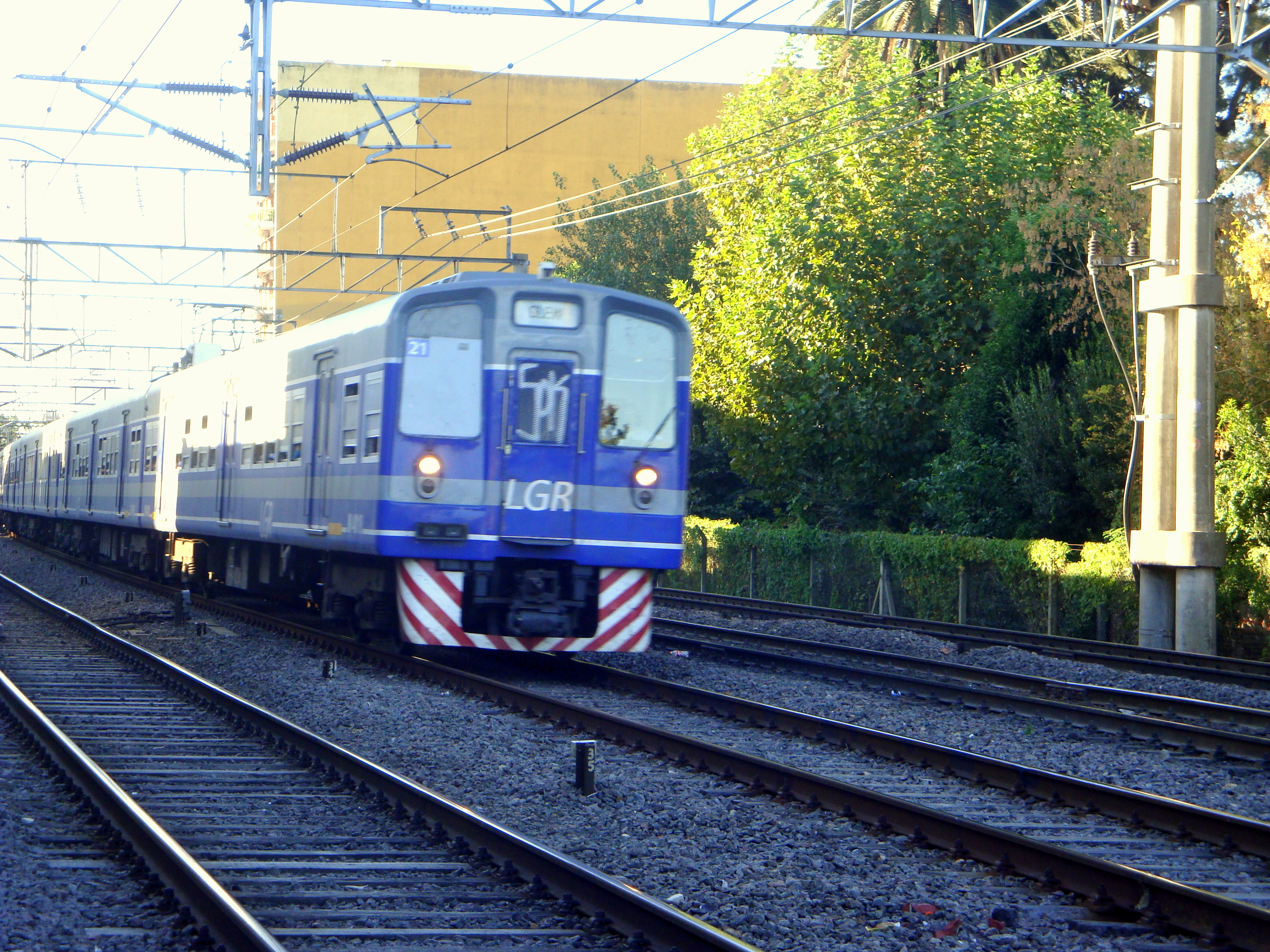 Formación a la salida de la Estación Lomas de Zamora